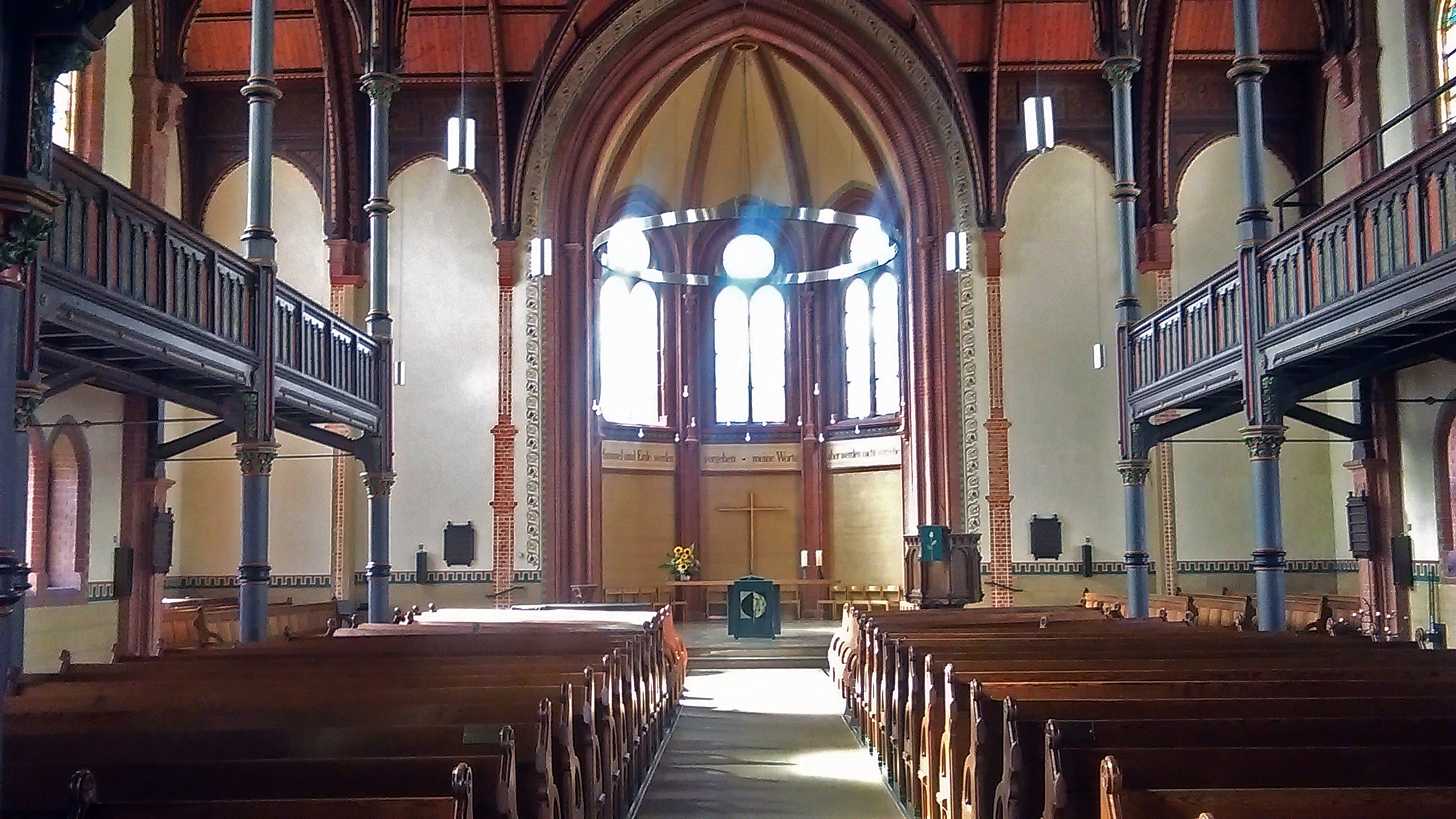 Evangelische Alte Kirche in Essen-Altenessen, erbaut 1890, Blick zum Chor, unter Denkmalschutz